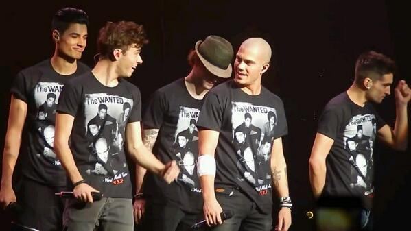 The Wanted Word Of Mouth World Tour 2014